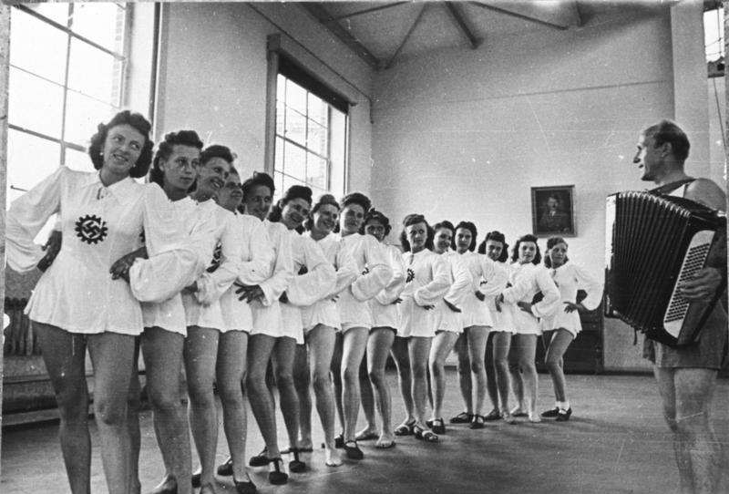 K.d.F.-Betriebssport. Tanz und Gymnastik unter Anleitung des Betriebssportlehrers, bringt Entspannung und Kraft für den neuen Arbeitstag.